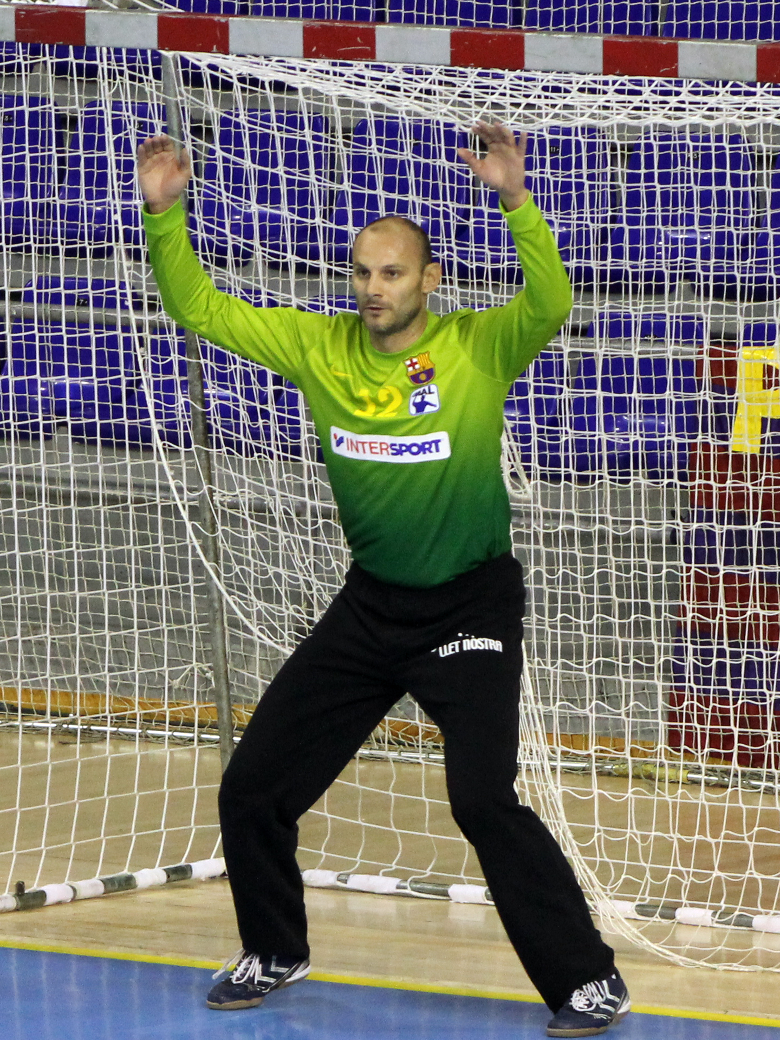 Foto realizada por Javier Segura (@castroquini en Twitter)